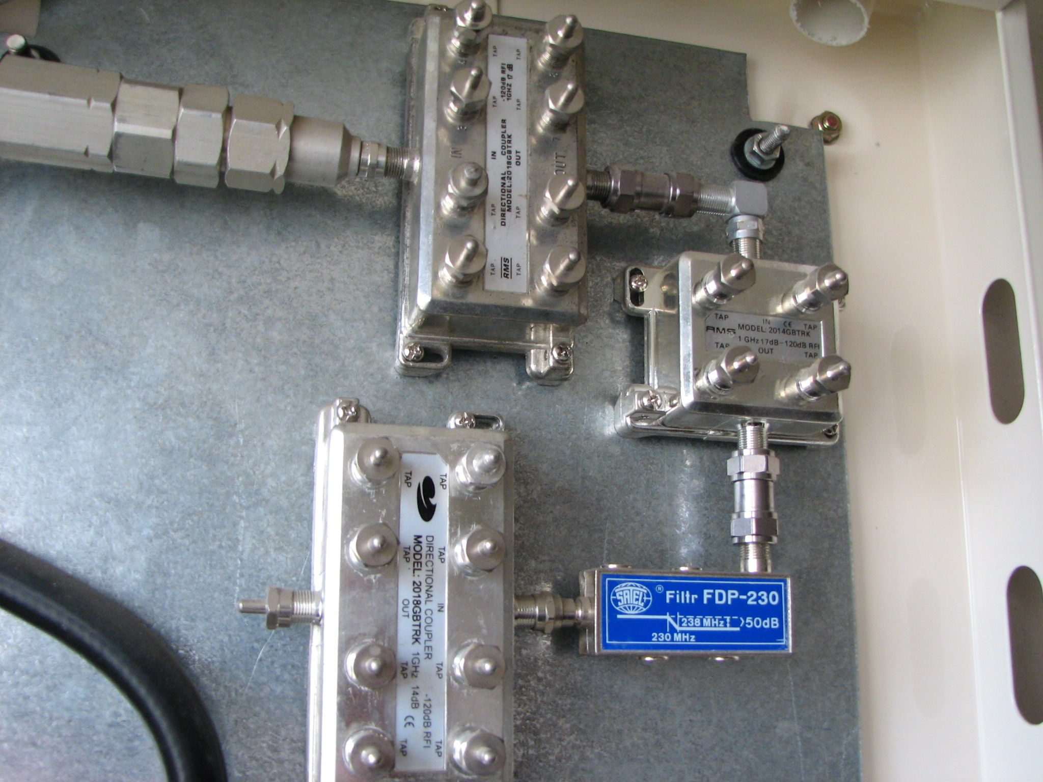 Multitap + Filtr dolnoprzepustowy w sieci HFC